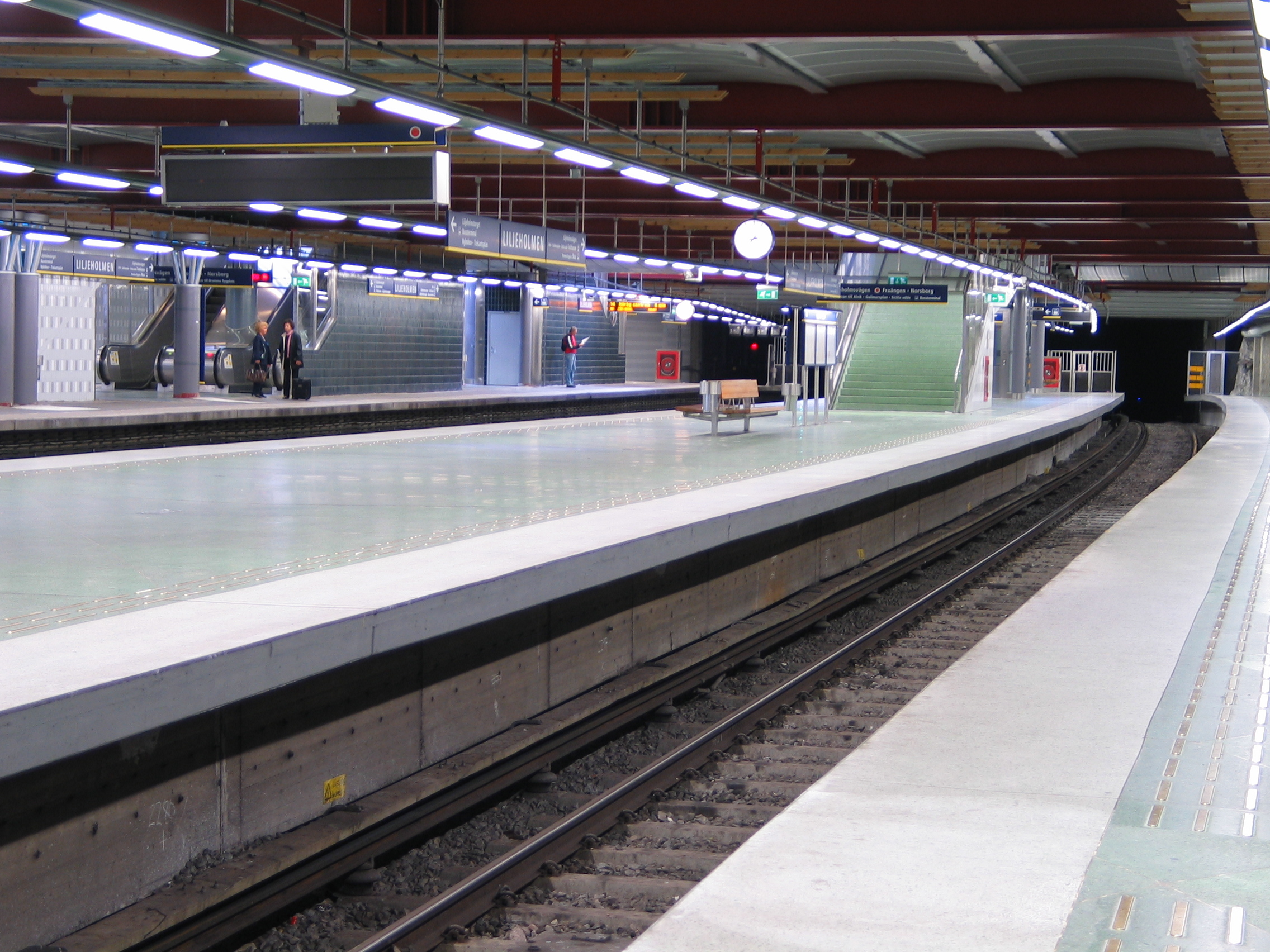 Liljeholmen, a metro station in Stockholm, Sweden.